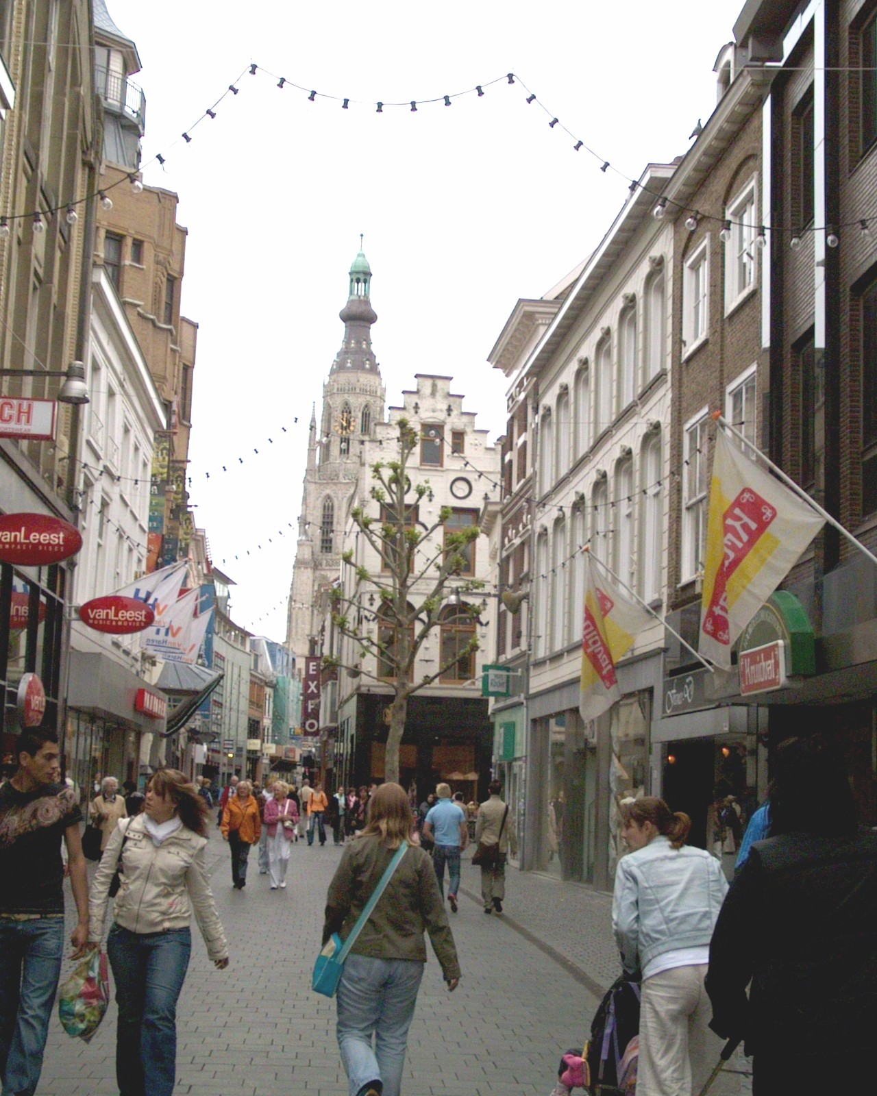 Zicht op een deel van de winkelstraat de Eindstraat, Breda gelegen in het centrum van Breda. Een verlengde van de winkelstraat de Ginnekenstraat, Breda